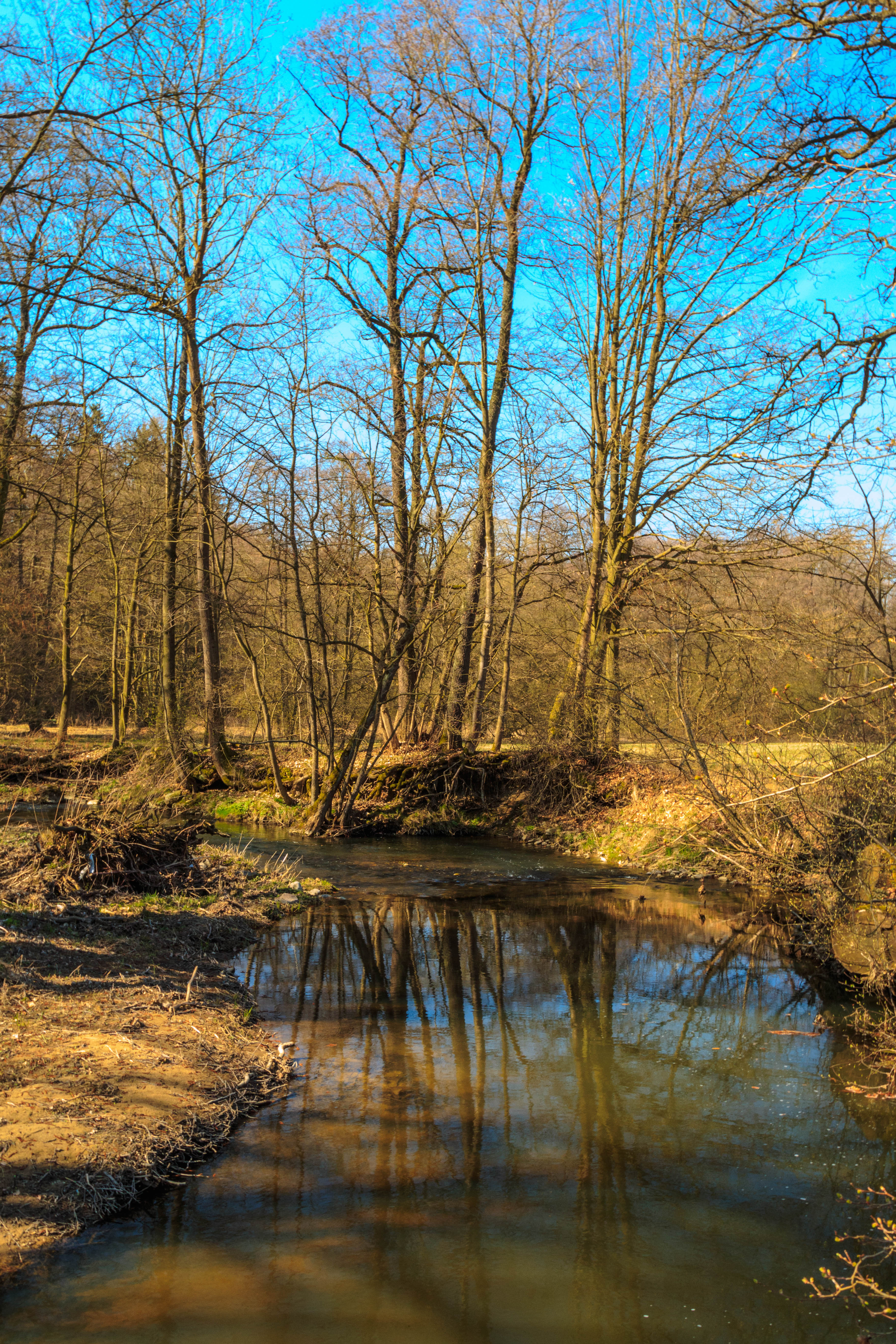 PR Svatomariánské údolí Project: Chráněná území.